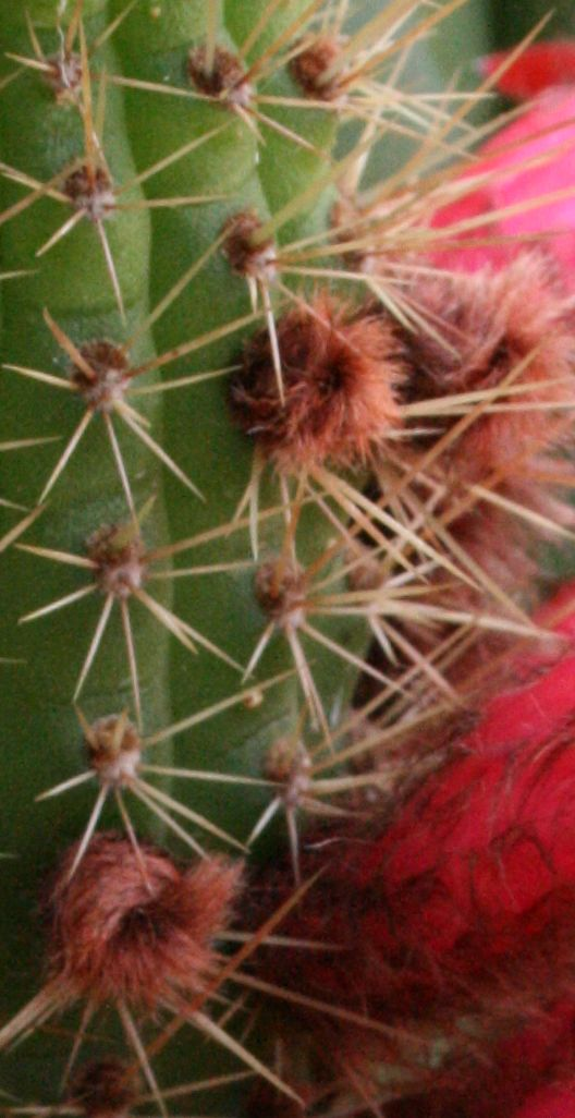 Cleistocactus samaipatanus virágrügyei